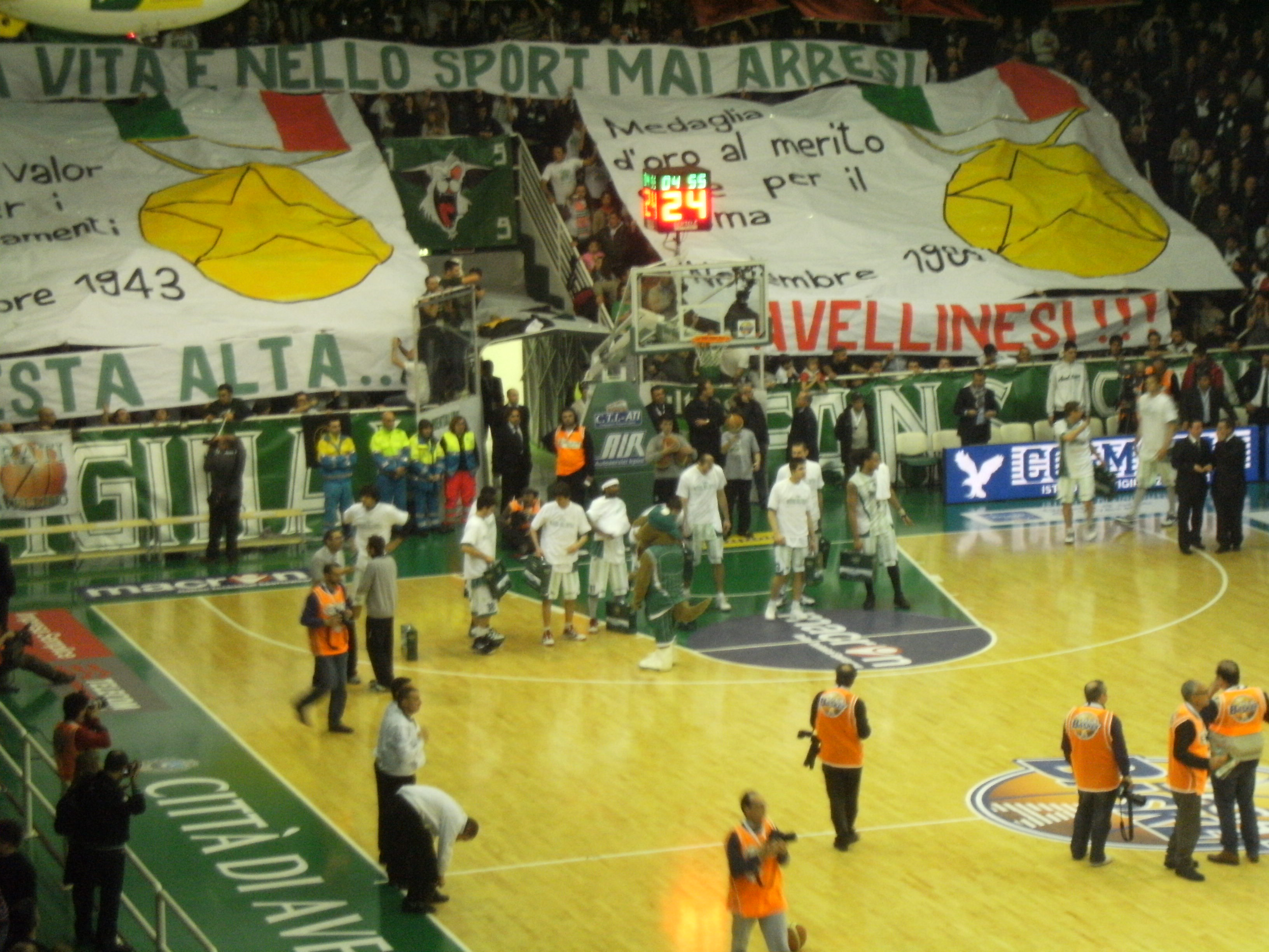 Coppa Italia di pallacanestro maschile 2010 Scandone Avellino - Olimpia Milano Quarti di finale